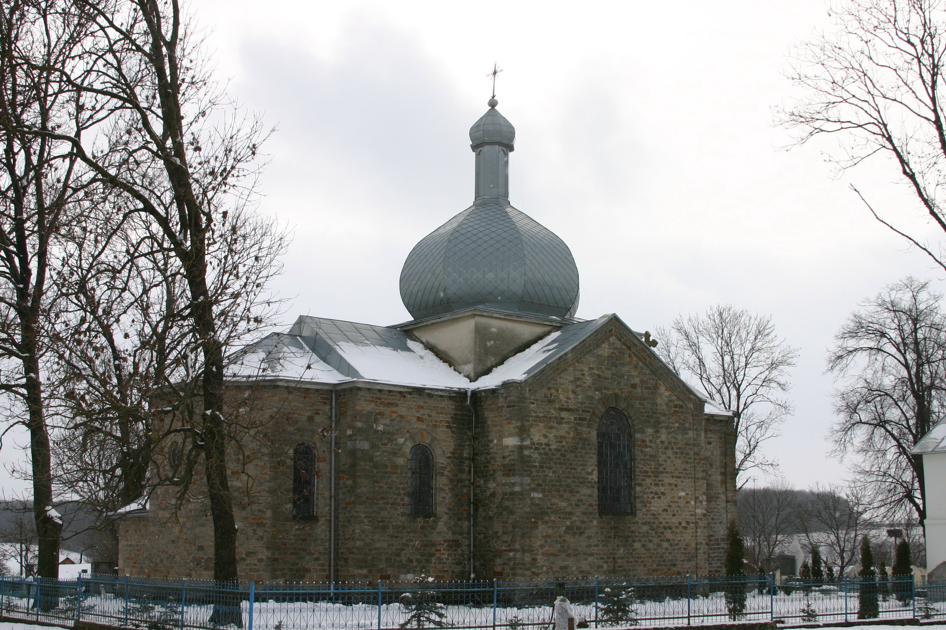 Crkv_sv._Mykolaya_Romanivka_2009_2.jpg: Церква св. Миколая в с. Романівка